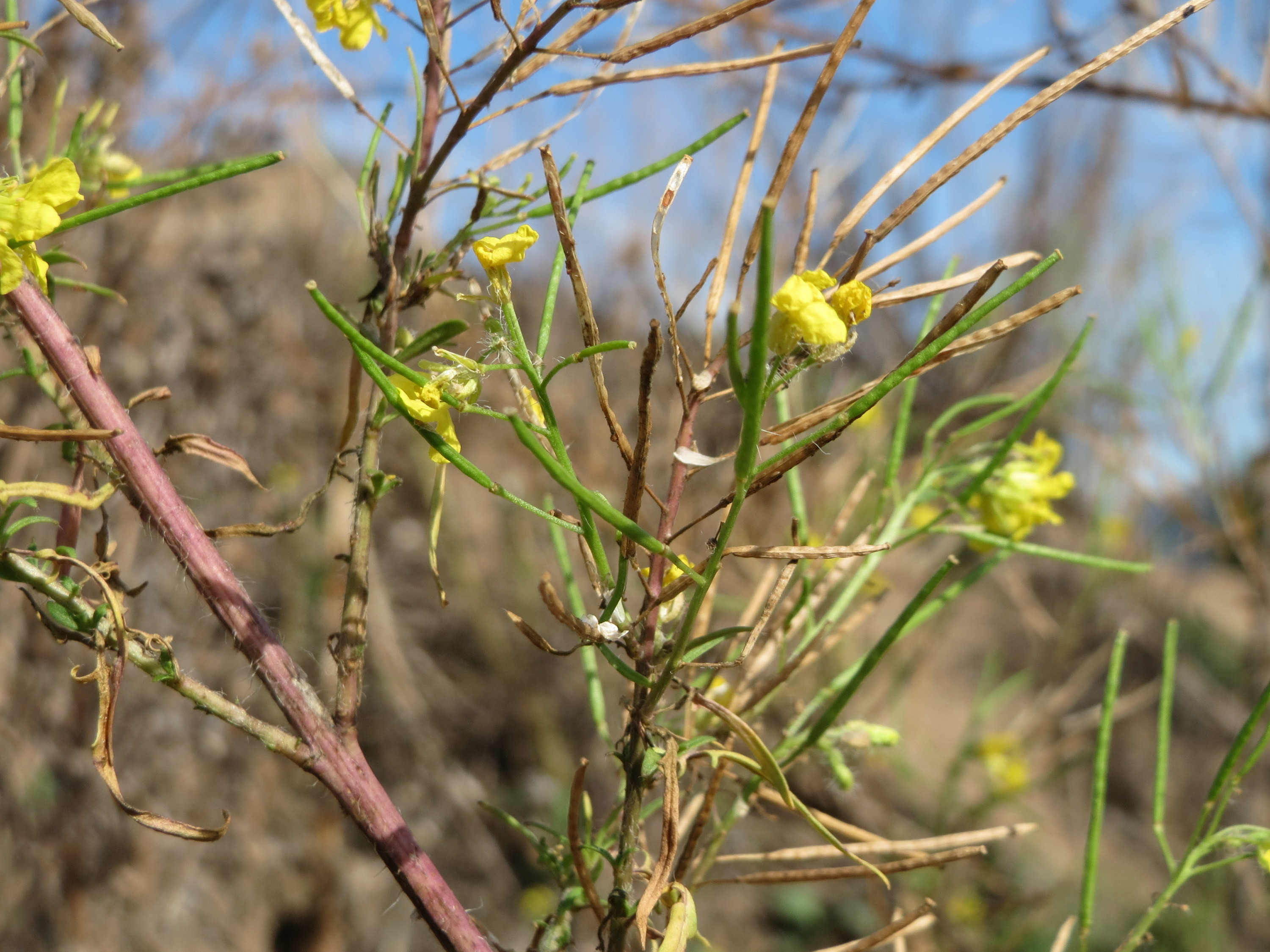 Loesels Rauke (Sisymbrium loeselii) in Hockenheim-Talhaus